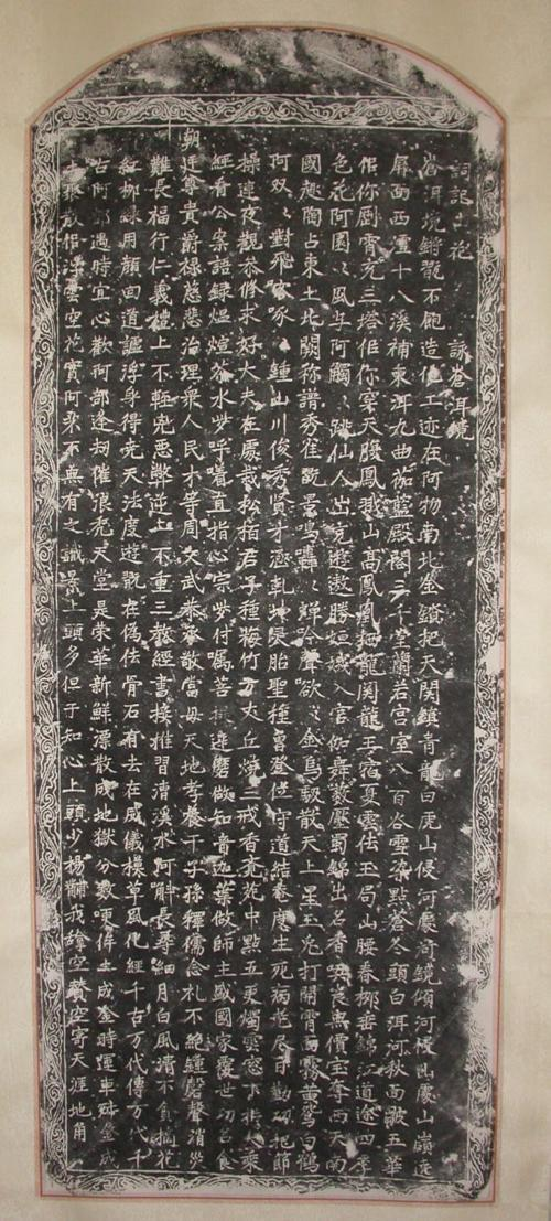 山花碑こと「詞記山花，詠蒼洱境」碑。 明景泰元年（1450）刻。 作者は明代大理の著名な文人、大理下陽溪の人楊黼。 漢字を用いてぺー語を表記したもので、ぺー族民族の「山花體」の格式にて大理蒼洱の風光を詠う。